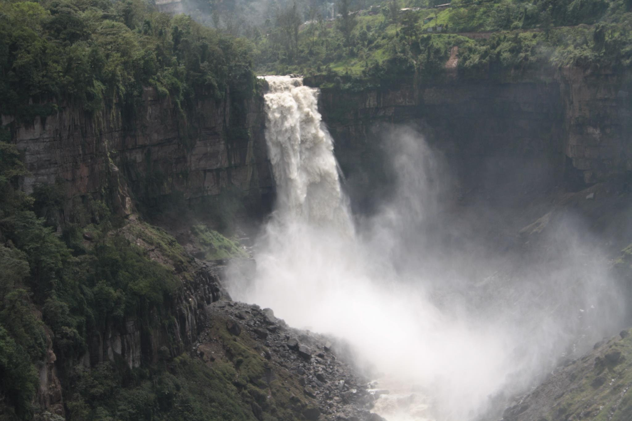 salto del tequendama, hermosa caída de agua ubicada en cundinamarca.